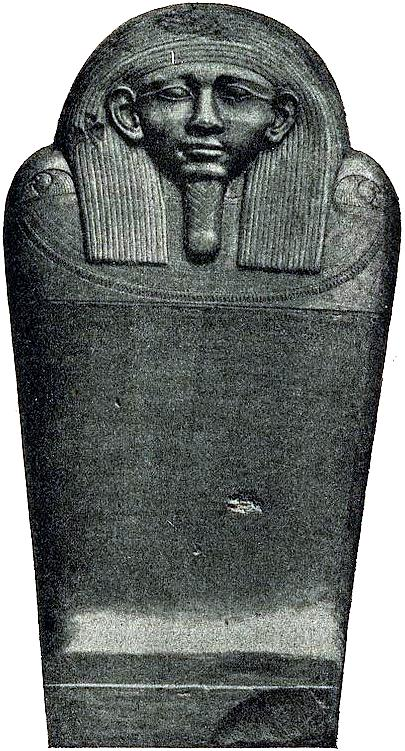 Sarcophage d'Eshmounazar, roi de Sidon, au Musée du Louvre (d'après le Corpus inscriptionum semilicarum).